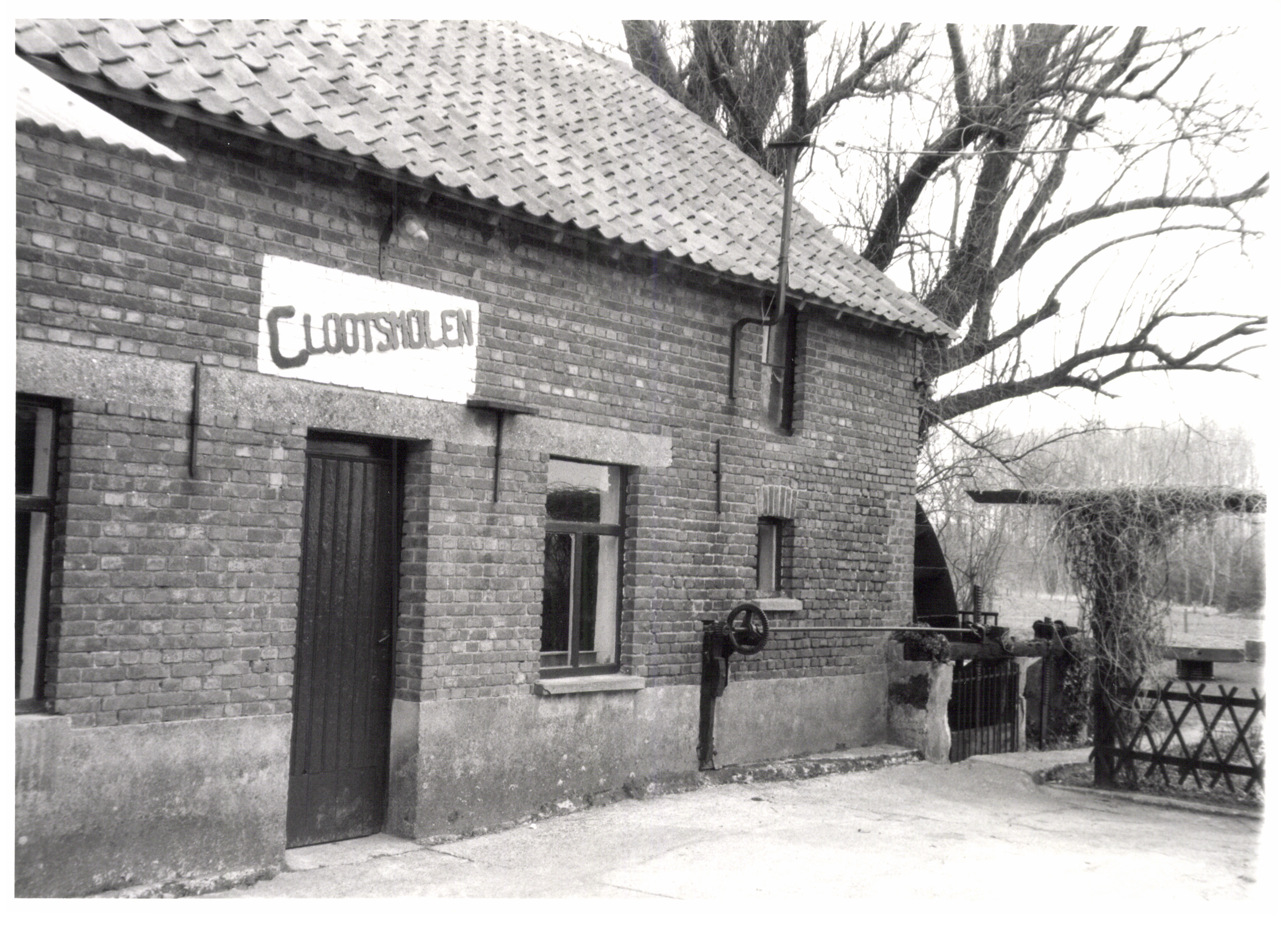 Watermolen Clootsmolen